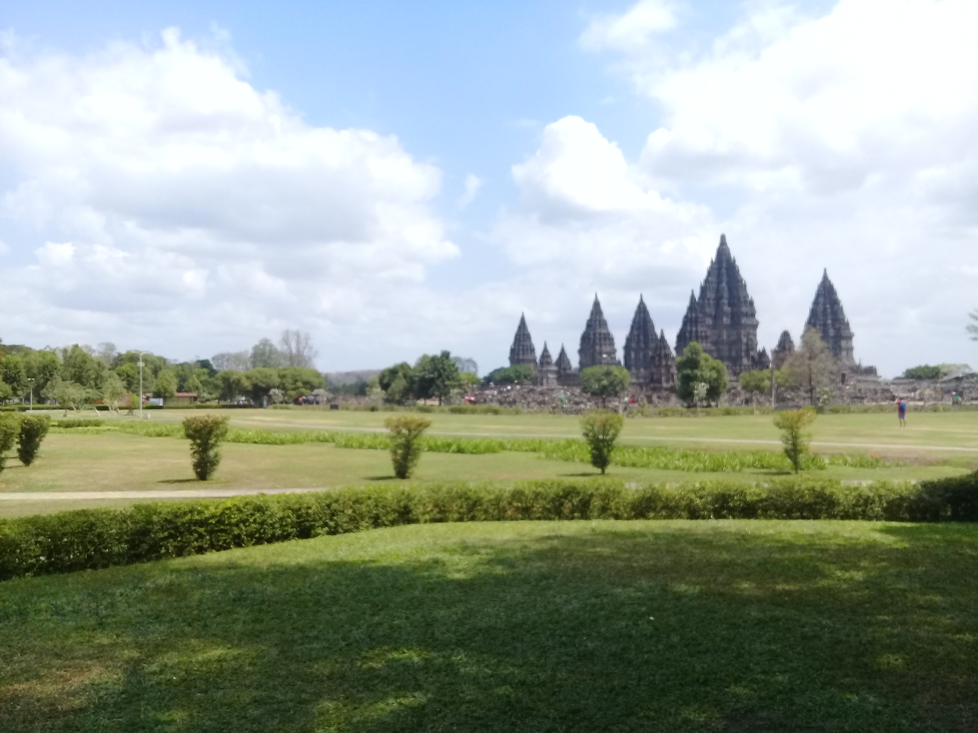 Jawa: Candhi Prambanan inggih punika salah sawijining candhi peninggalan saking kerajaan Hindhu wonten Indonesia. Candhi punika wonten ing kutha Yogyakarta, Indonesia.